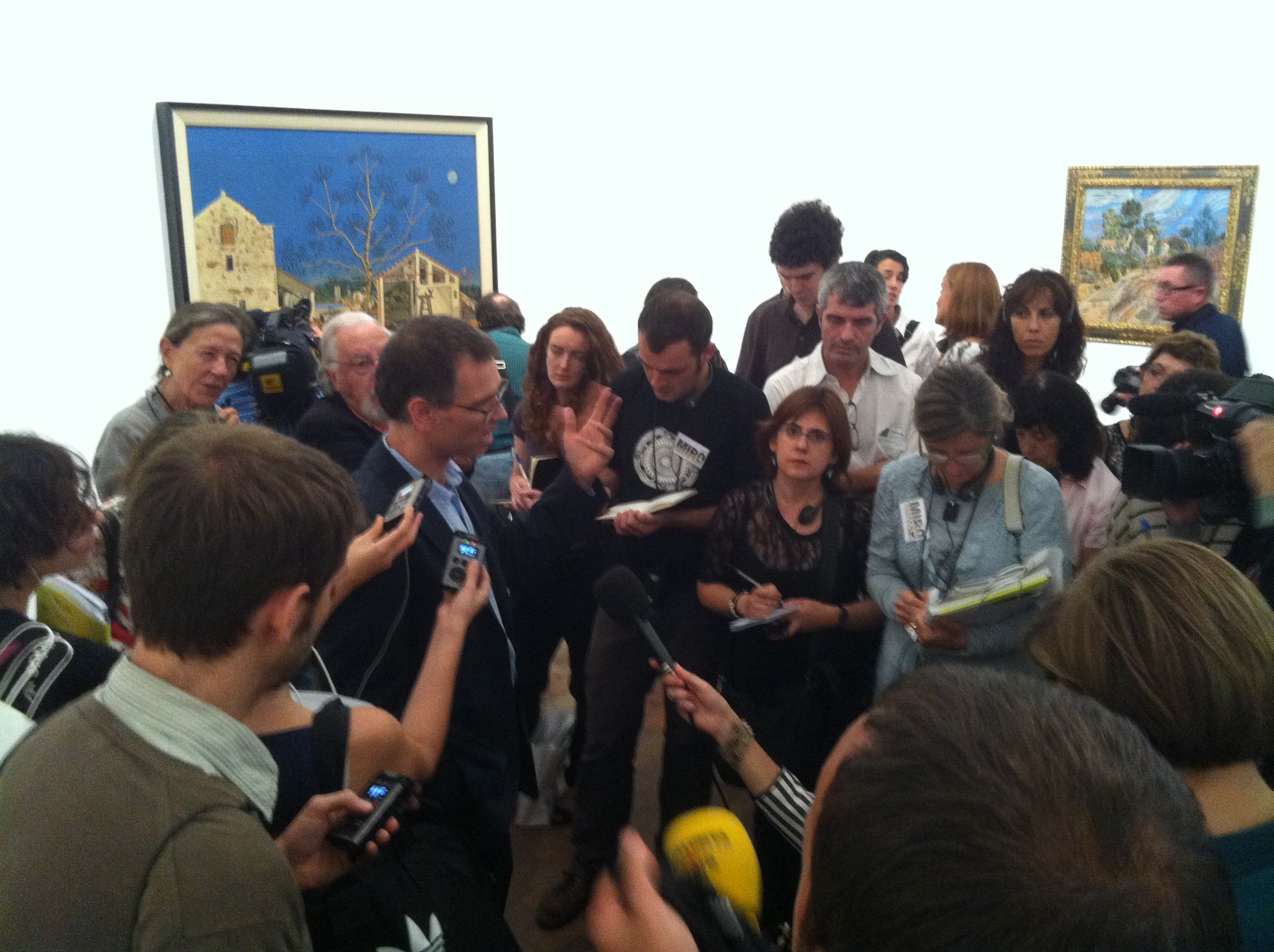 Miró-L'escala de l'evasió. Curators speech